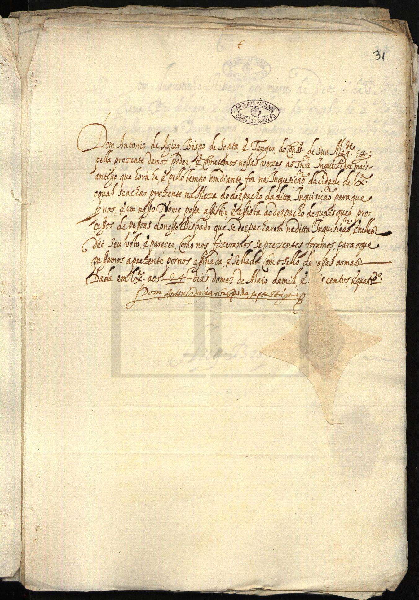 Fº 31 do livro das comissões ou procurações passadas aos inquisidores, ANTT